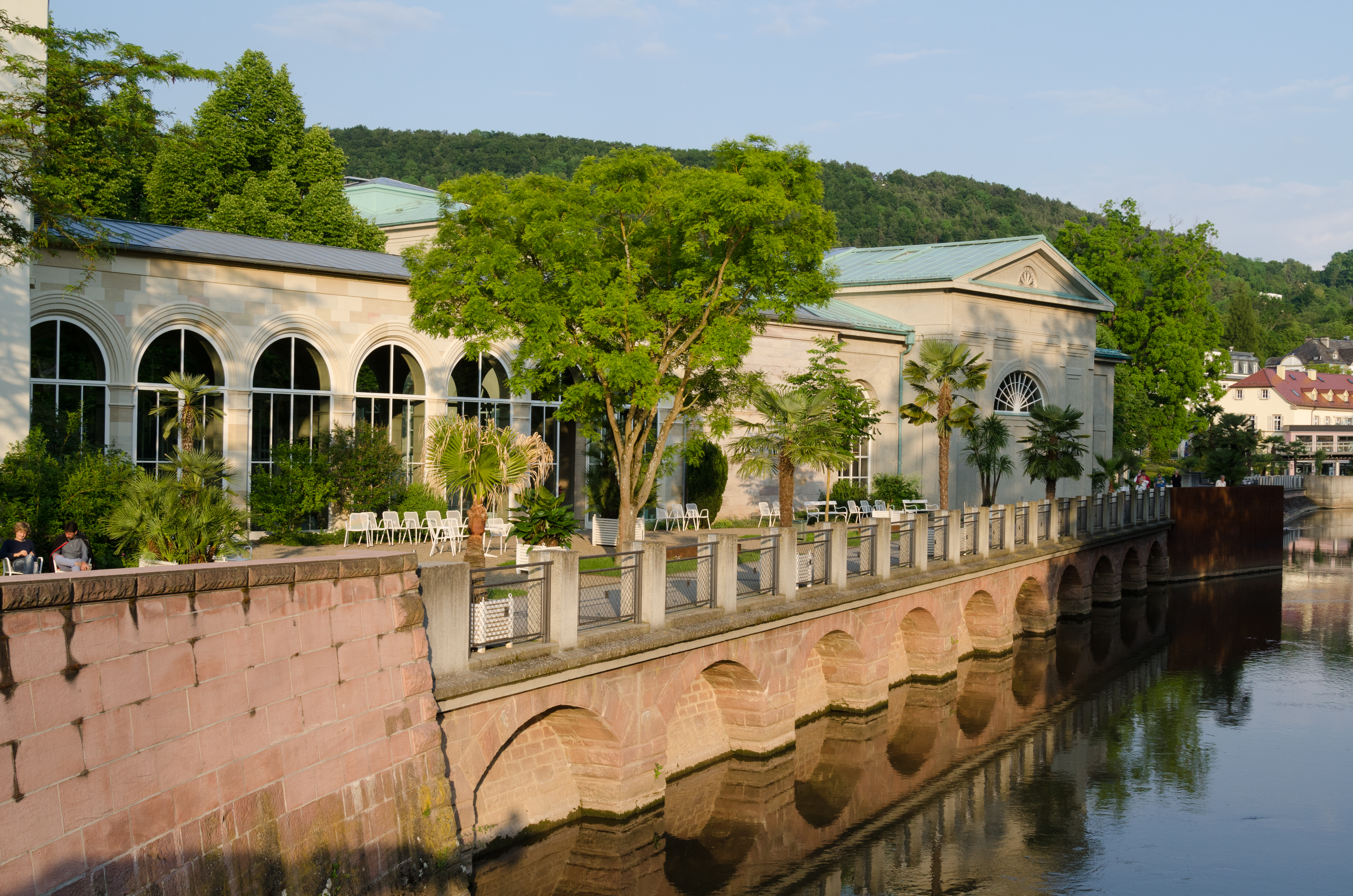 Bad Kissingen, Am Kurgarten 10